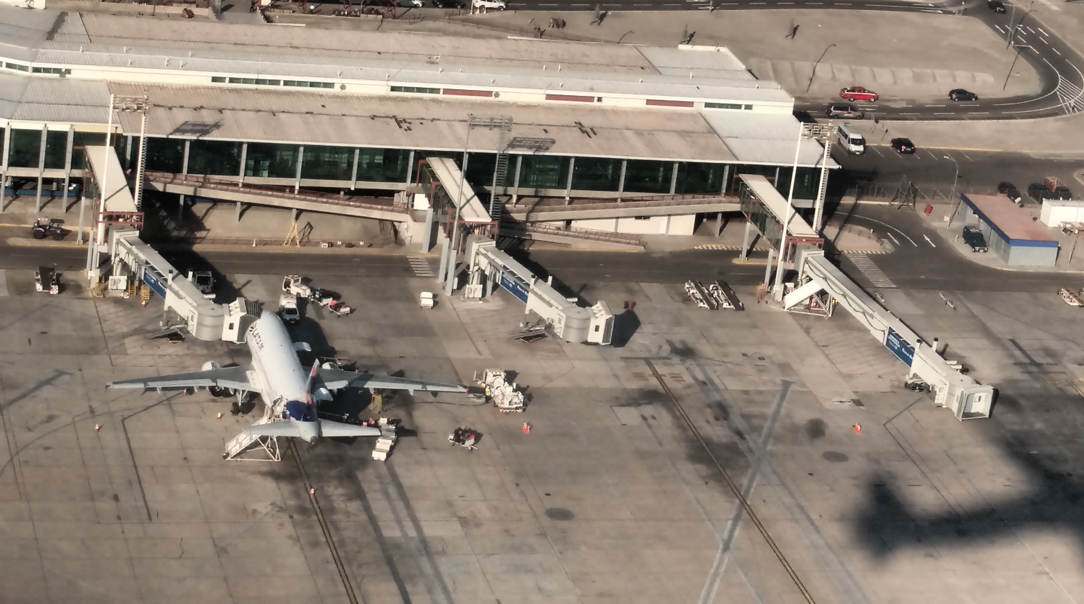 Avión con pintura de LATAM Airlines visto desde el aire.